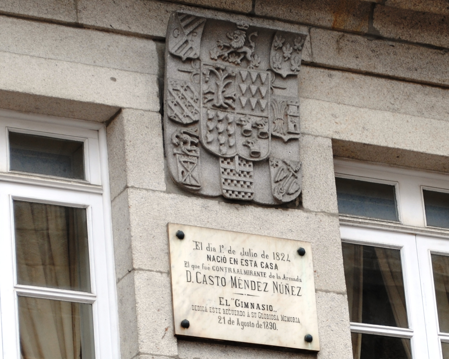 Casto Méndez Núñez. Escudo